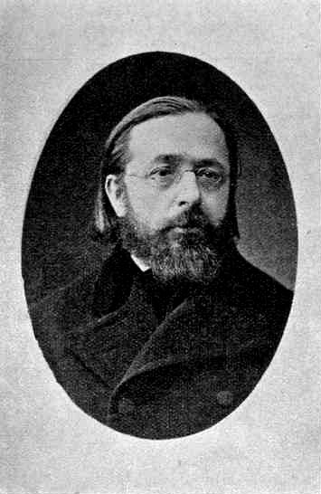 Paweł Stalmach